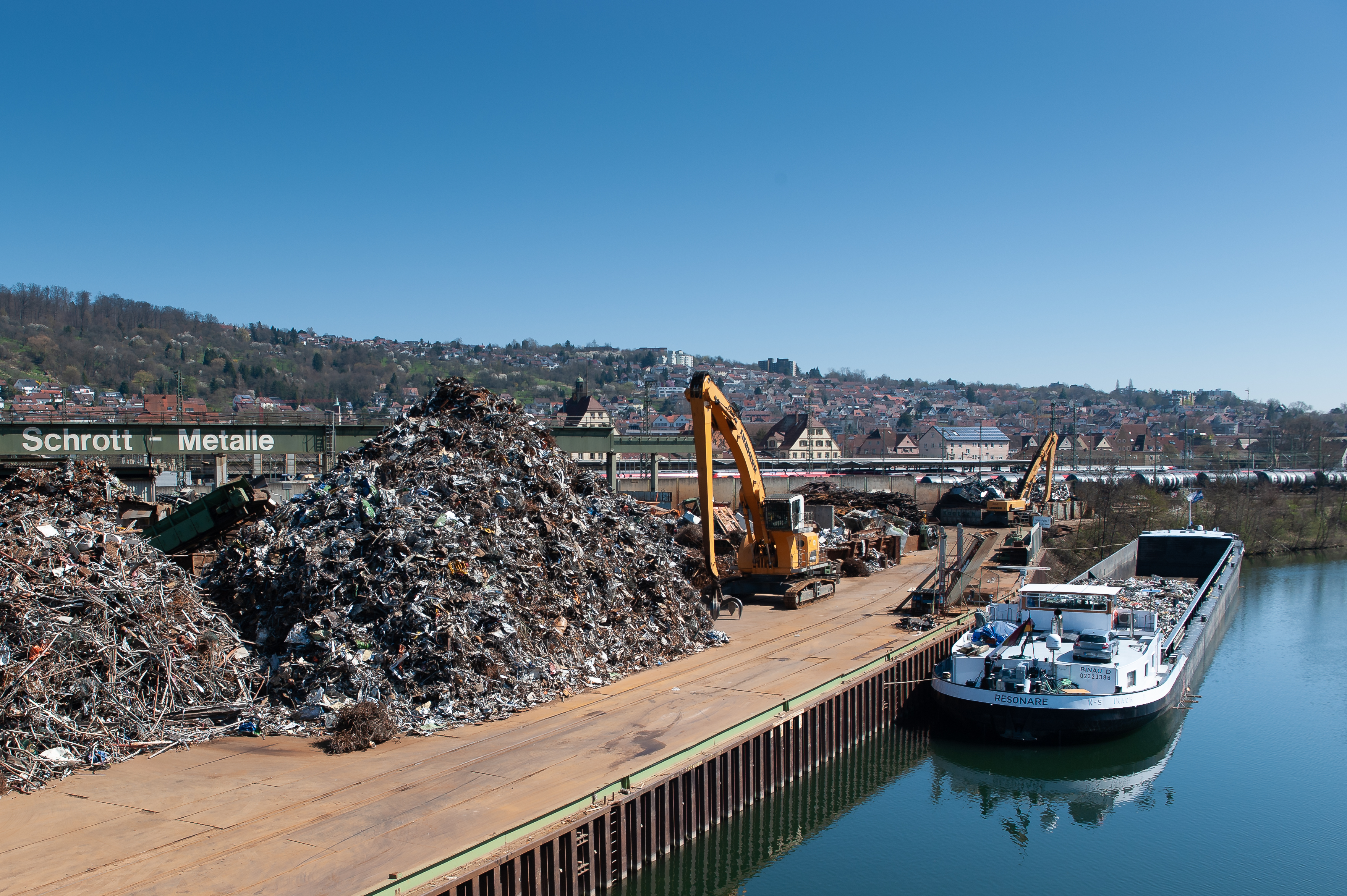 Schrottverladung im Hafen von Plochingen